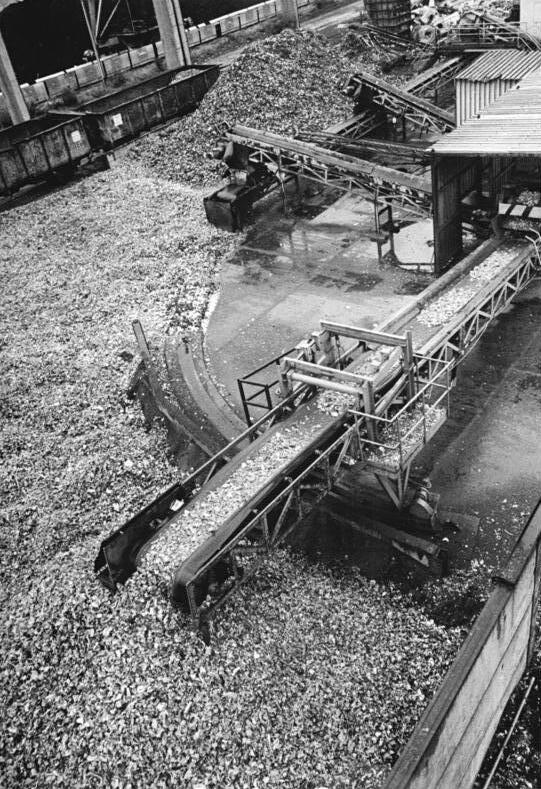 ADN-ZB Gahlbeck 12.8.88 Bez.Leipzig: Schrottaufbereitung - Elf Tonnen Aluminiumschrott pro Betriebsstunde können in der modernen Schrottaufbereitungsanlage des Leichtmetallwerks Rackwitz nach einer patentierten Technologie wiederverwendbar gemacht werden. Nach dem ersten Zerkleinern im sogenannten Shredder werden sämtliche anhaftenden Bestandteile aus Eisen, Nichteisenmetallen und nichtmetallischen Resten vom Sekundäraluminium getrennt und ebenfalls einer Wiederverwendung zugeführt. Der gesamte in der DDR anfallende Alu-Schrott wied in Rackwitz aufbereitet und zu Gußlegierungen weiterverarbeitet. -Siehe auch 10 N.